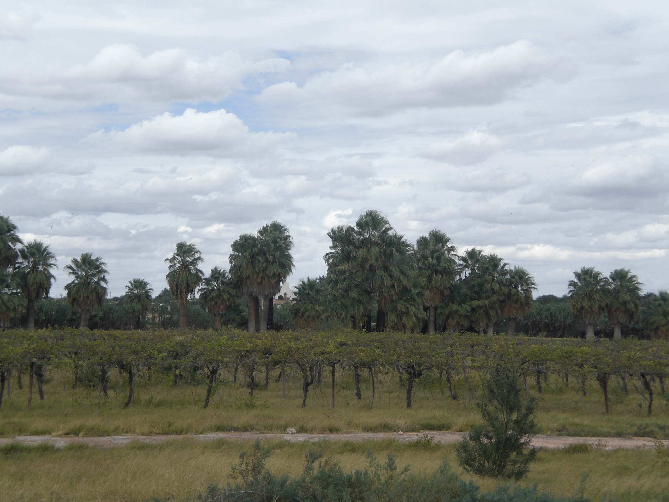 Weinanbau in Stampriet